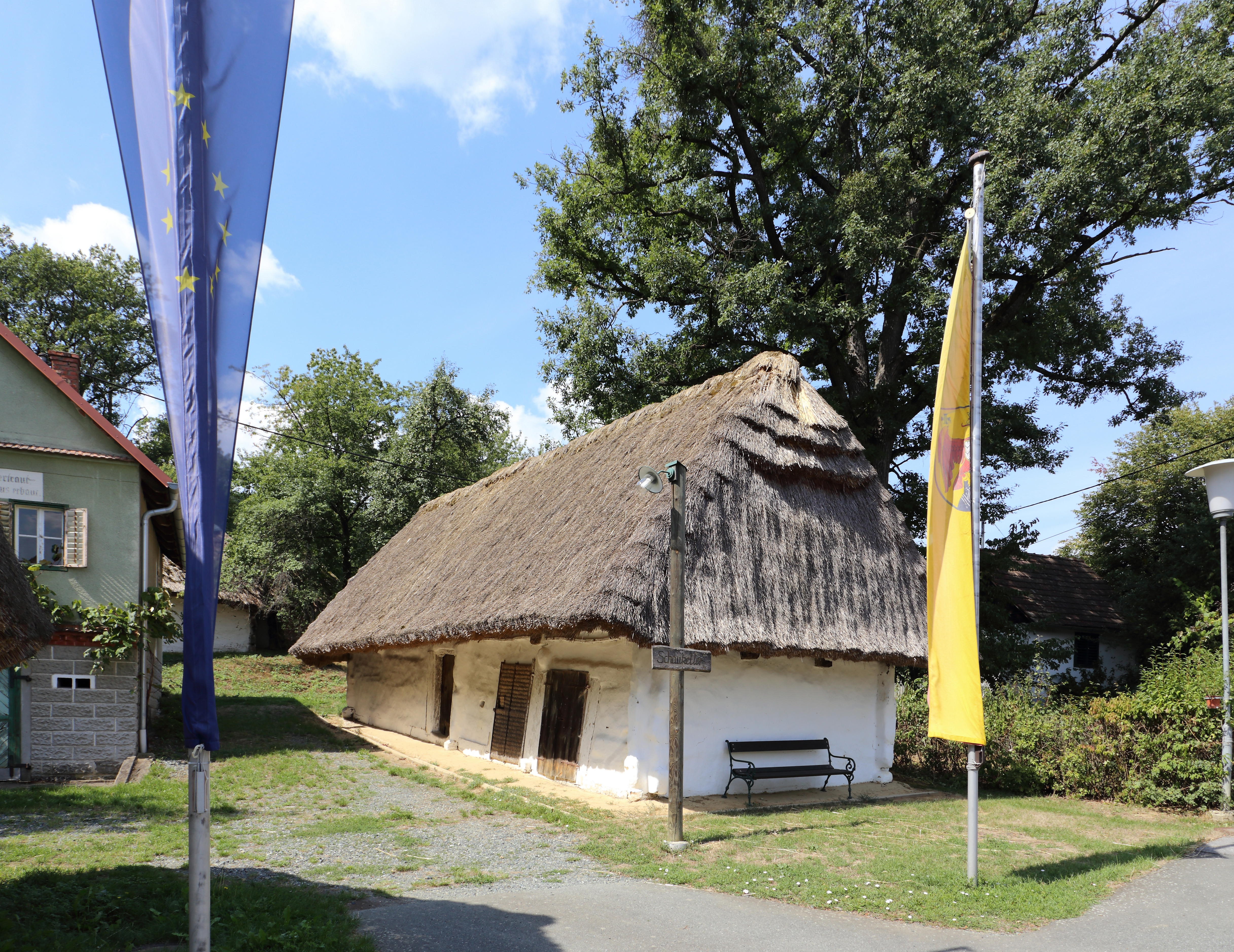 Kellerviertel 79 (Schaukeller), ein Teil des etwa 2 Kilometer langen Kellerviertels in der burgenländischen Gemeinde Heiligenbrunn. Eine lockere Reihung von Weinkellern und Speichern aus dem 18. und 19. Jahrhundert. Ursprünglich meist niedrige Holzblockbauten mit lehmverschmierten, weißgekalkten Wänden und abgewalmten Satteldächer mit Strohdeckung.